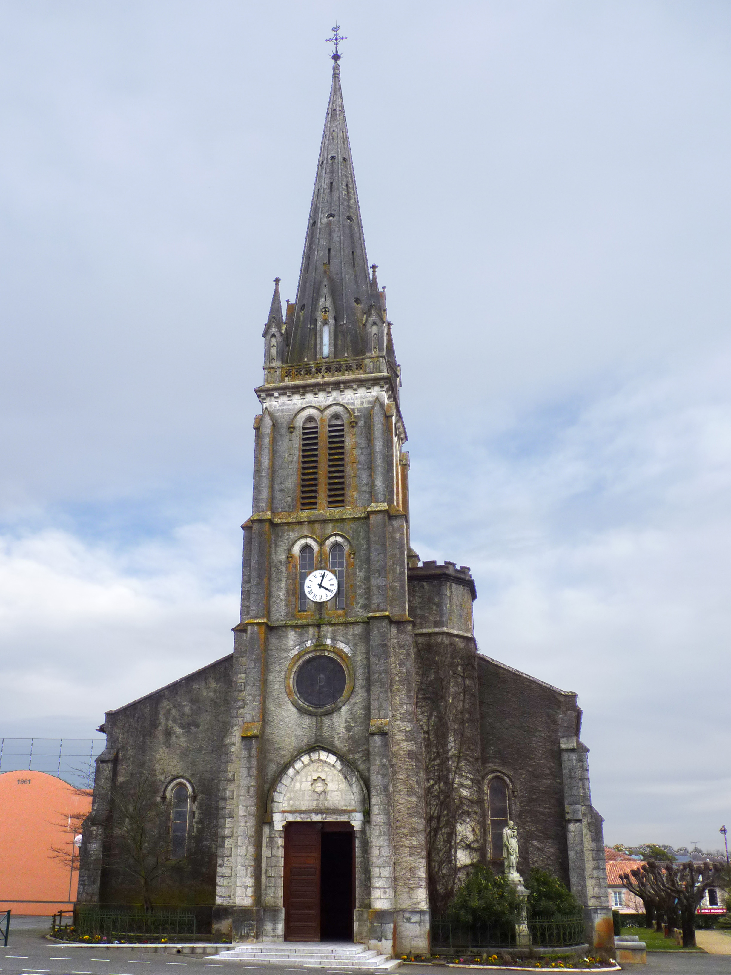 Eglise de Pouillon